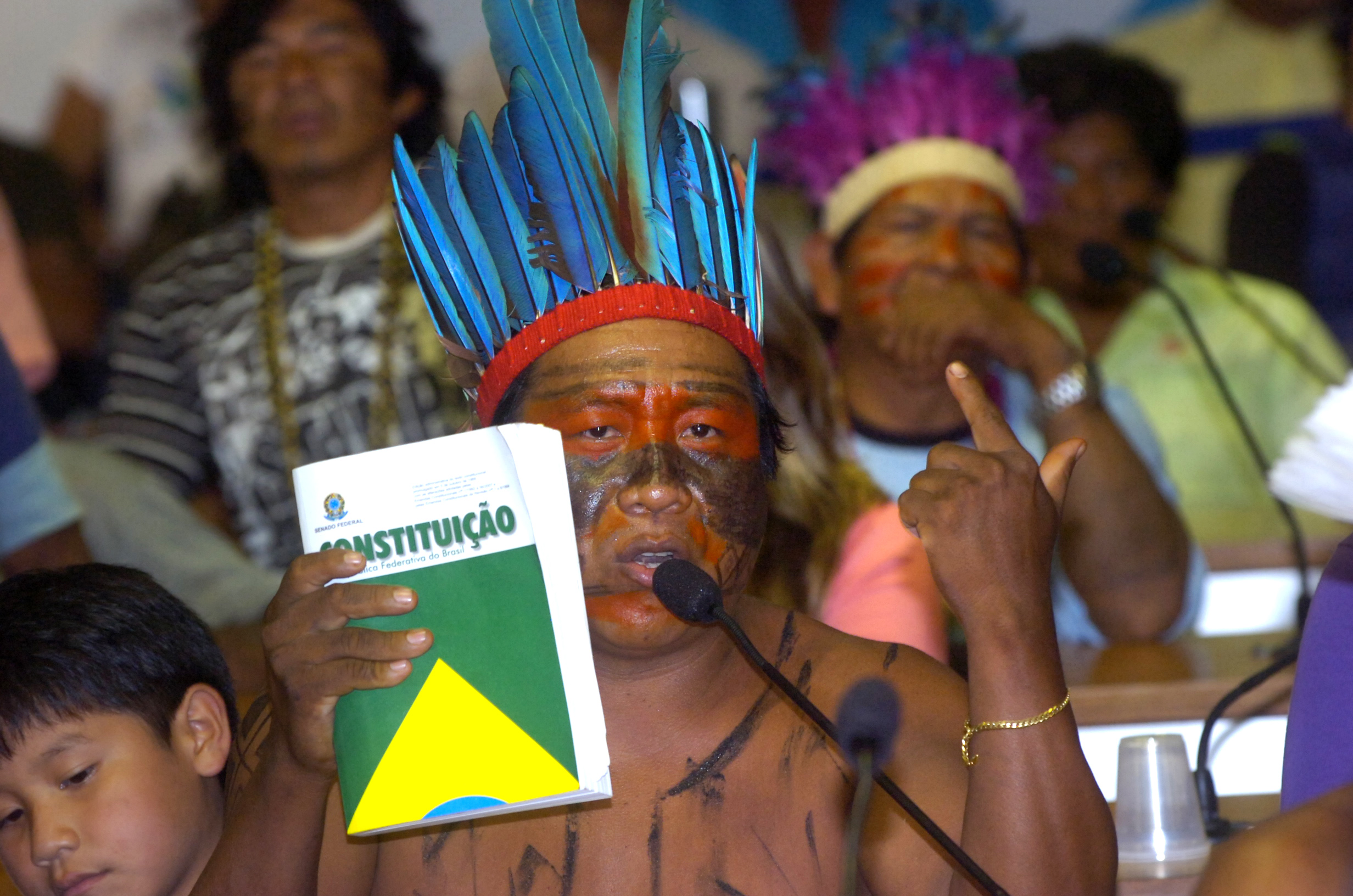 Indígena pede a palavra em audiência pública da Comissão de Direitos Humanos e Legislação Participativa (CDH) que discutiu os problemas gerados a partir de edição do decreto 7.056/09, que que reformula FUNAI. Maio de 2010 Fotógrafo: J. Freitas